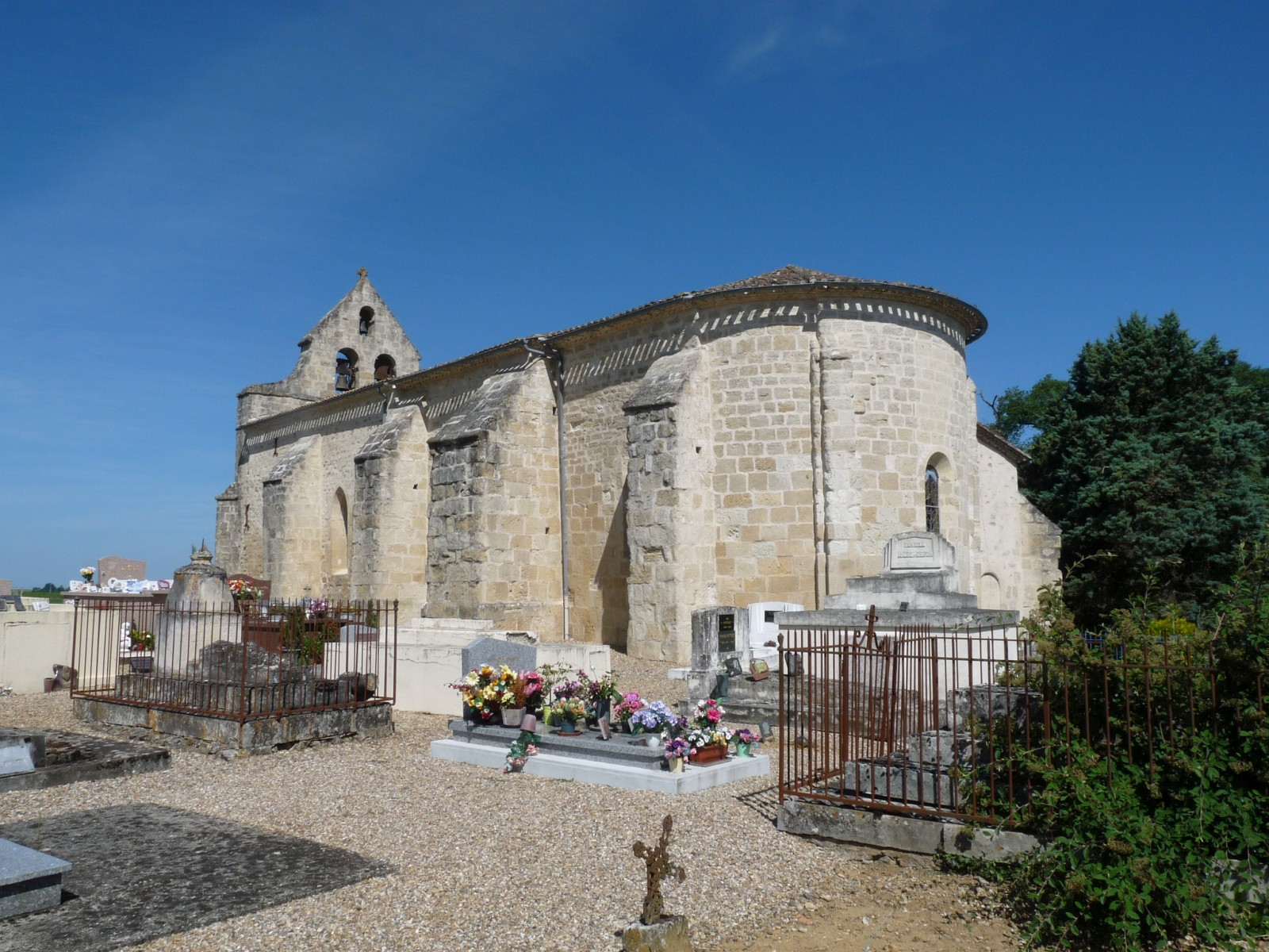 Eglise de Juillac, Gironde, France